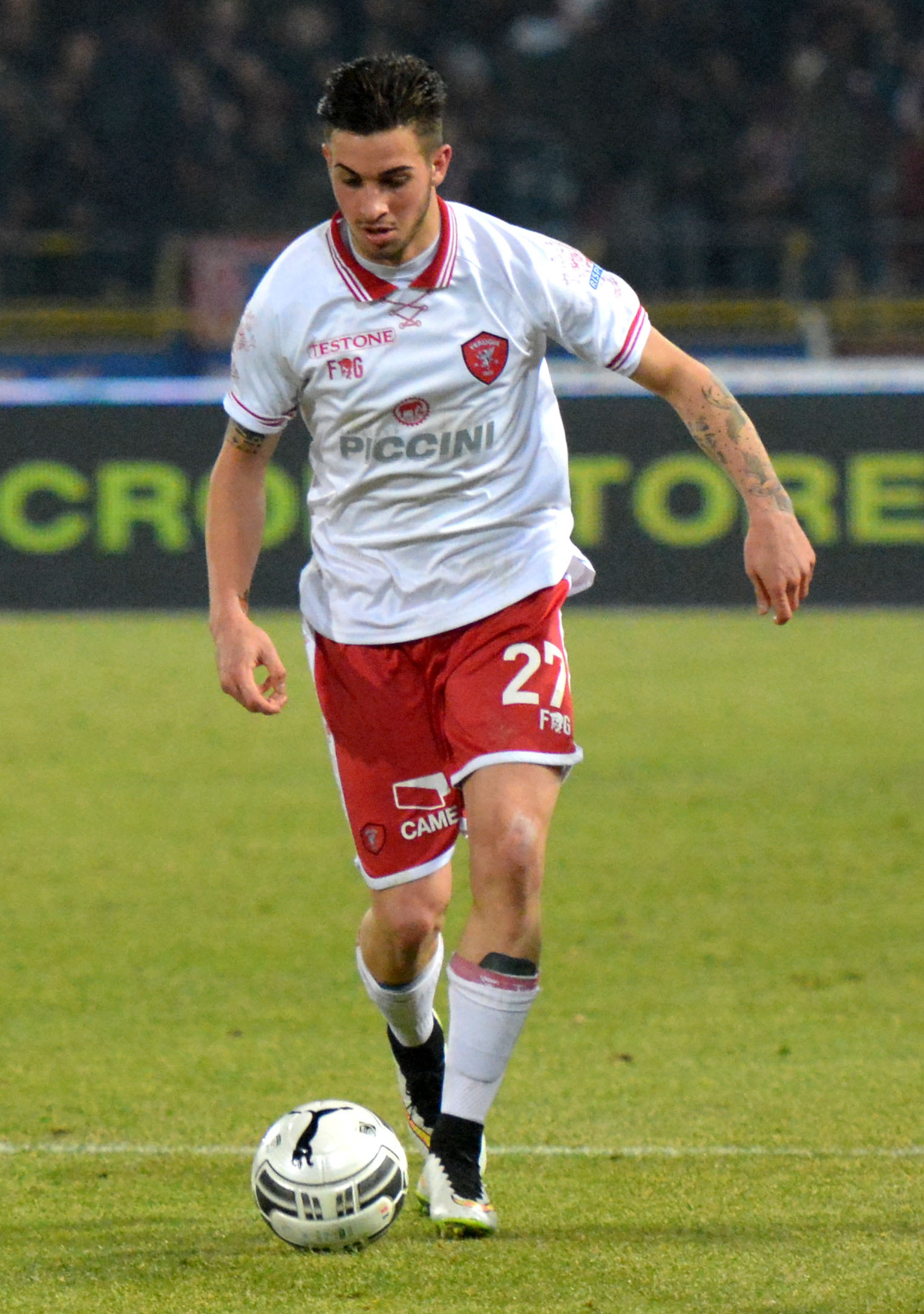 Vittorio Parigini, calciatore italiano, in azione con la maglia del Perugia.